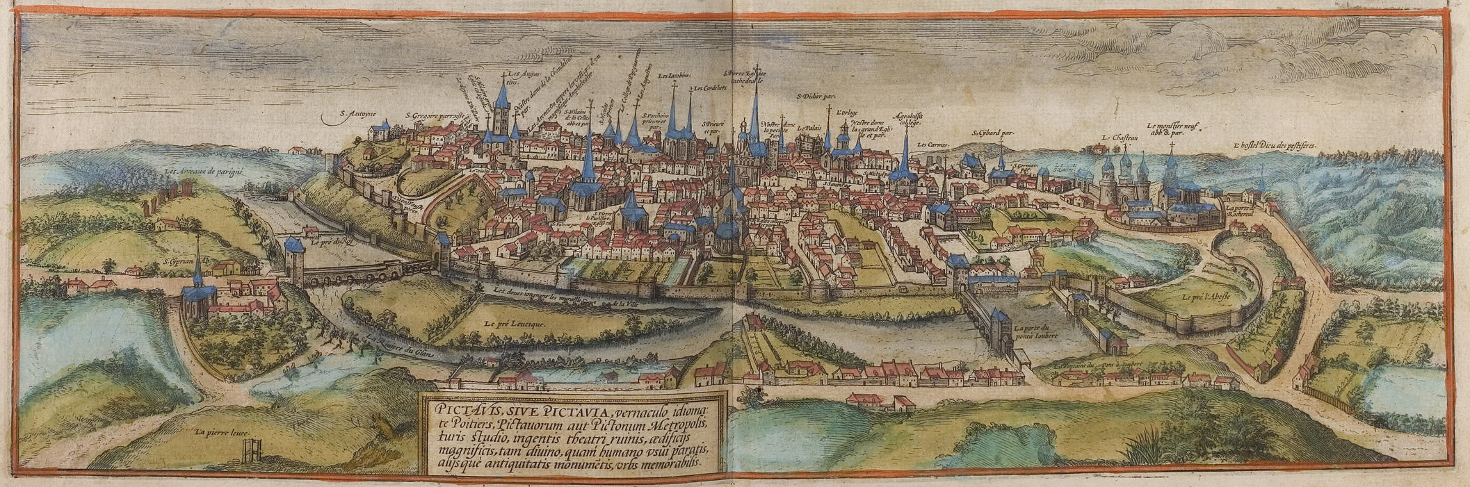 Poitiers